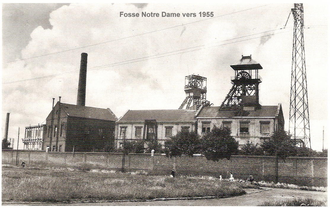 Fosse Notre Dame à Waziers de la Cie des Mines d'Aniche